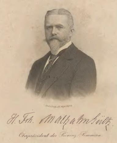 Helmuth von Maltzahn, German minister of Finance